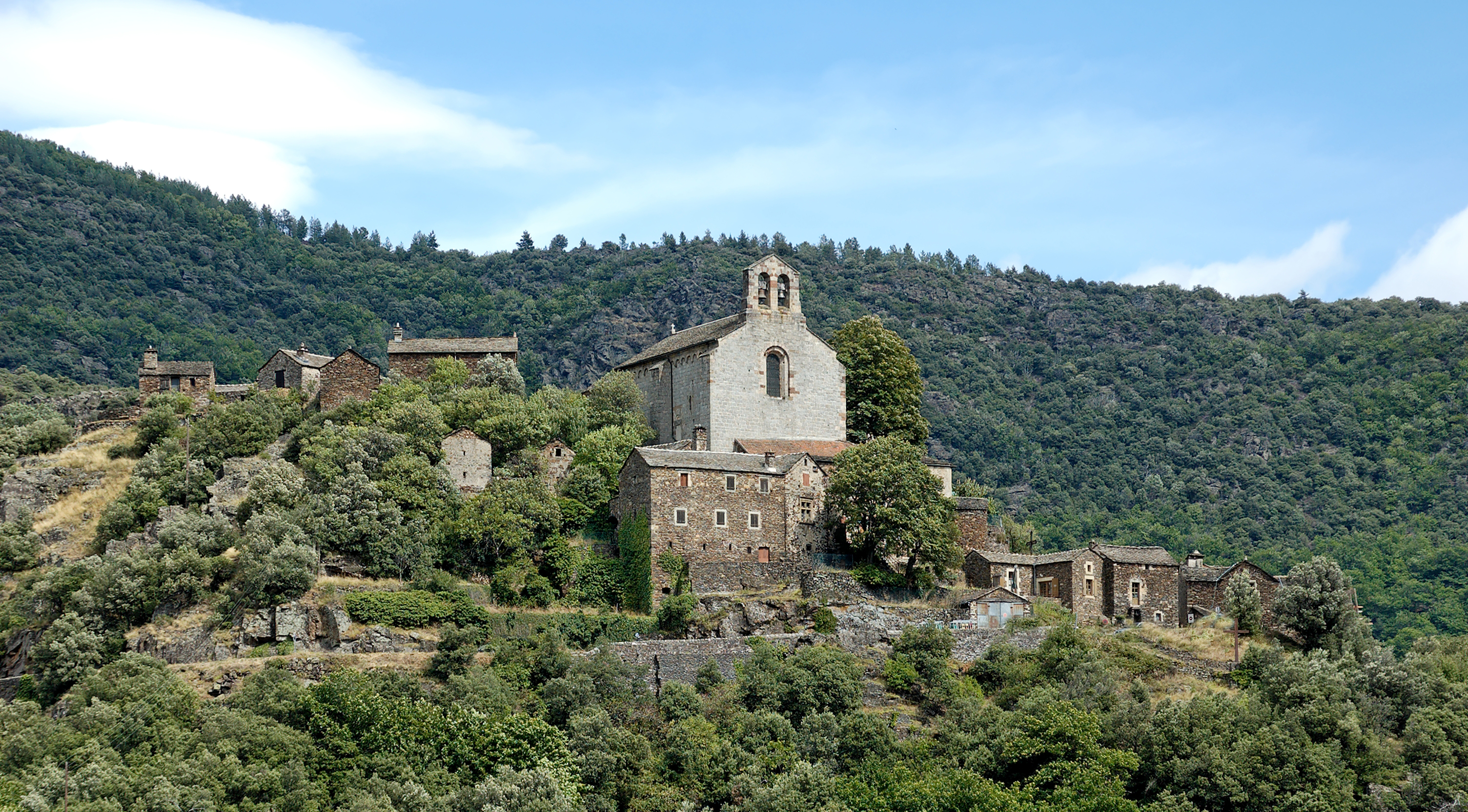 Vue générale de Thines Ardèche France